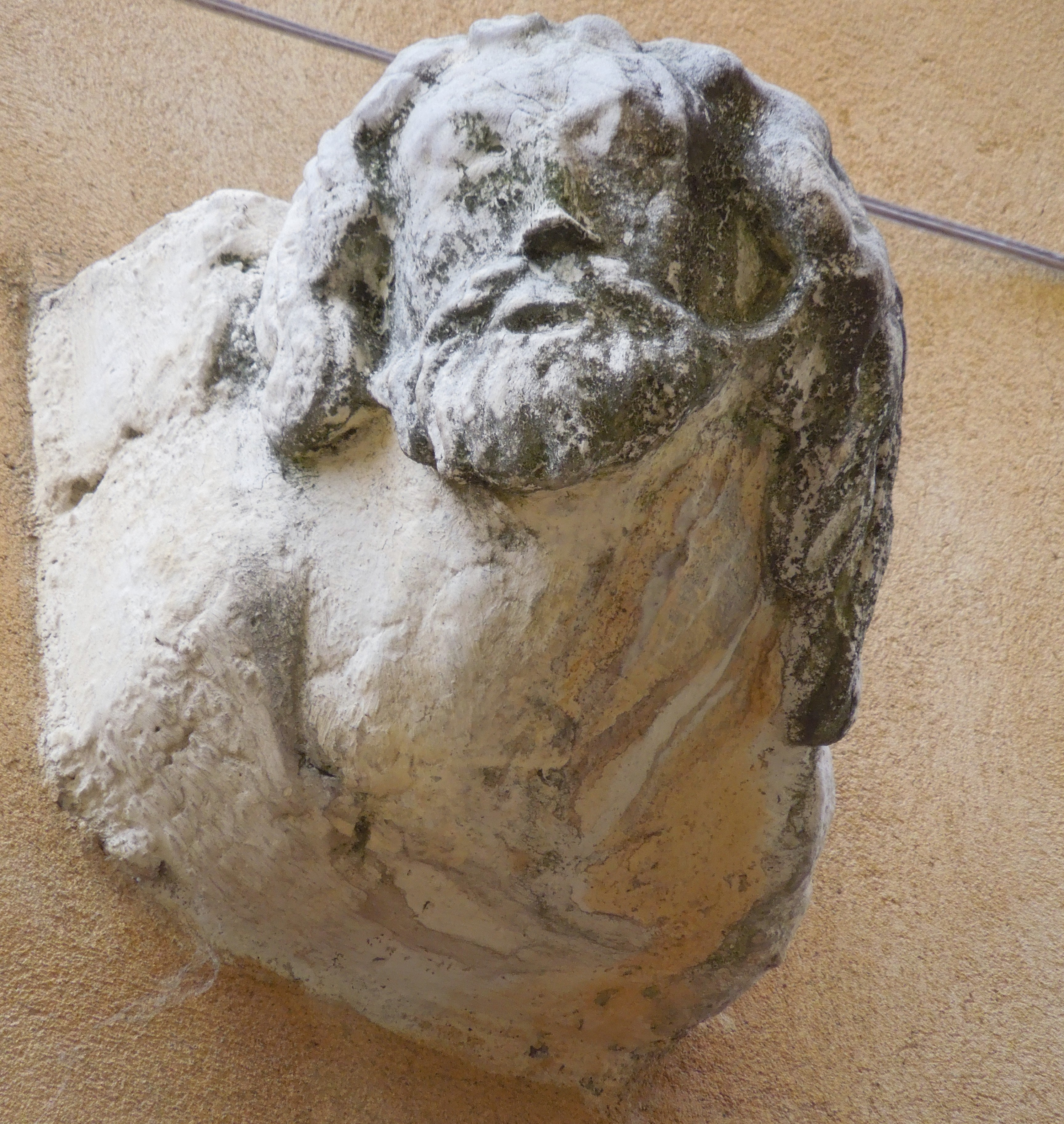 Nîmes (Gard, France), dans la partie la moins connue de l’Écusson, centre historique de la ville, au 6 de la rue Fresque (parallèle au boulevard Victor Hugo), derrière une sobre façade refaite en 1773, le négociant Léon Novi, de retour de Gênes, a fait réalisé en 1665 de somptueux aménagements inspirés de l'art baroque italien.